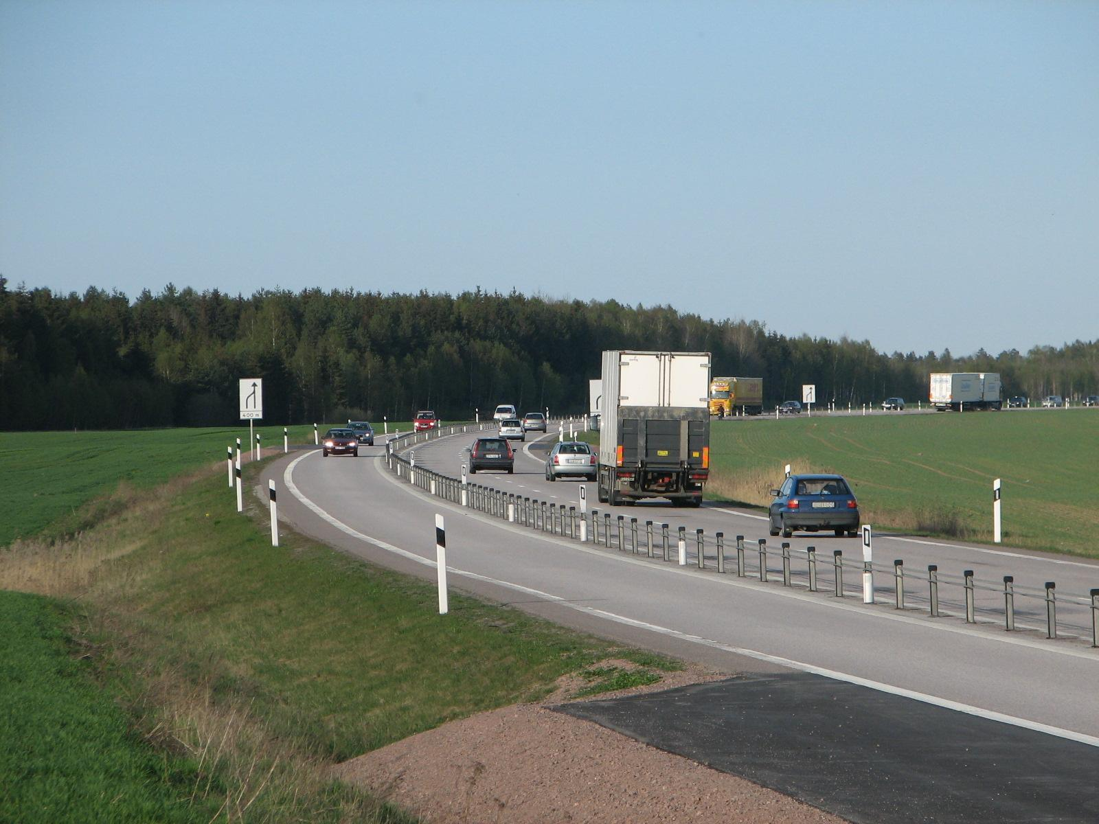 E20 väster om Skara, en typisk 2+1 väg